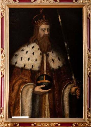 Retrat imaginari de l'emperador franc Carles el Calb